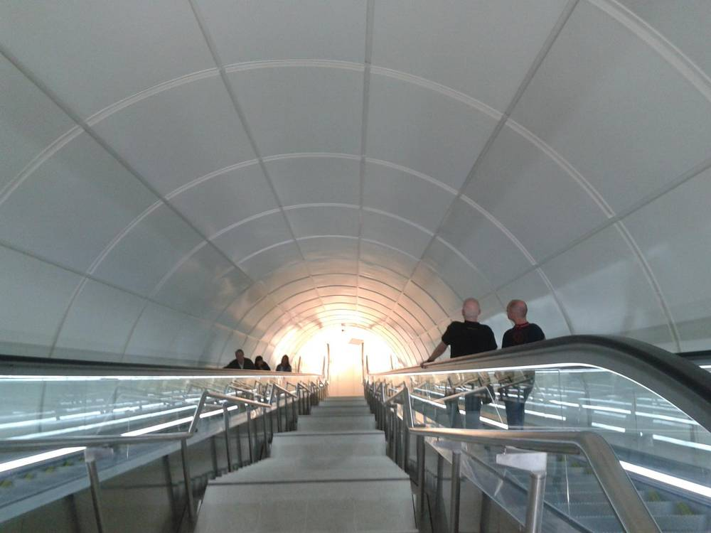 Intxaurrondo, Donostiako trenbide geltokia, eskilara mekanikoa